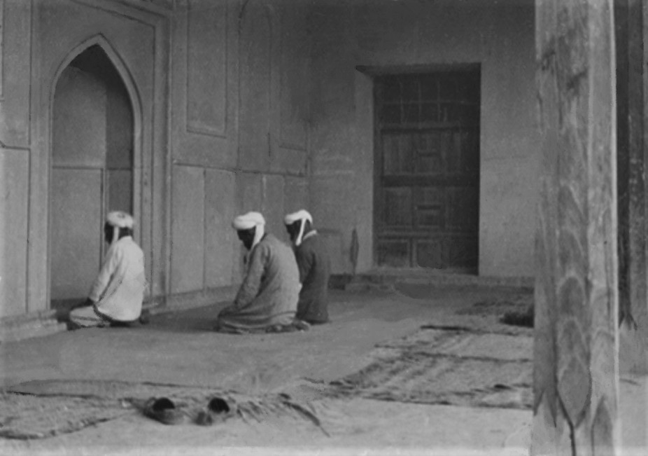 Узбеки на молитве